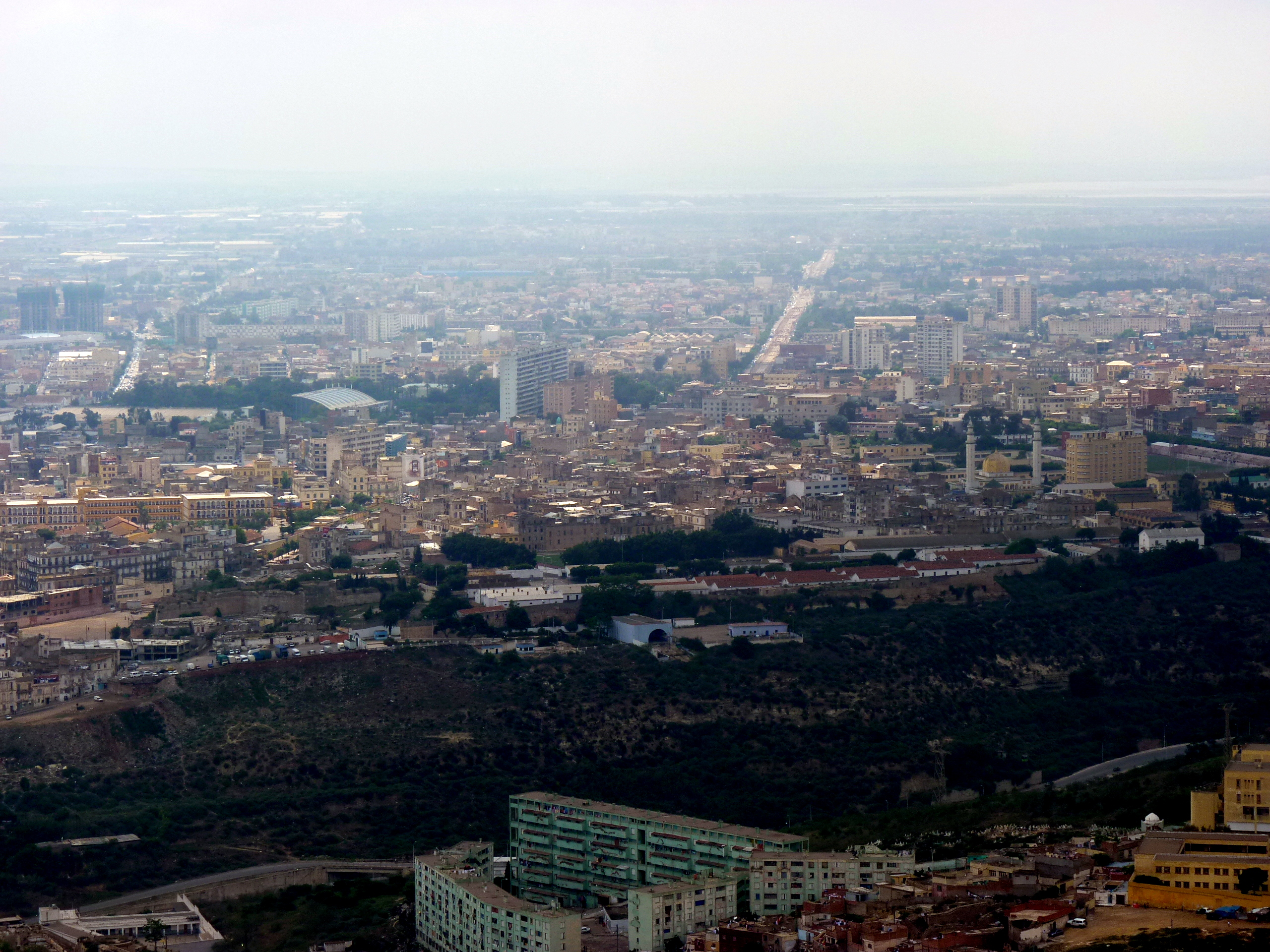 Algérie Mai 2011